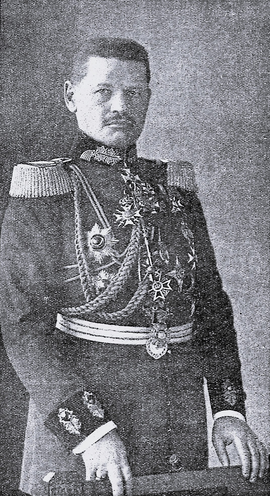 Generalmajor Curt v. Morgen, der neue Kommandeur der 81. Infanterie-Brigade.